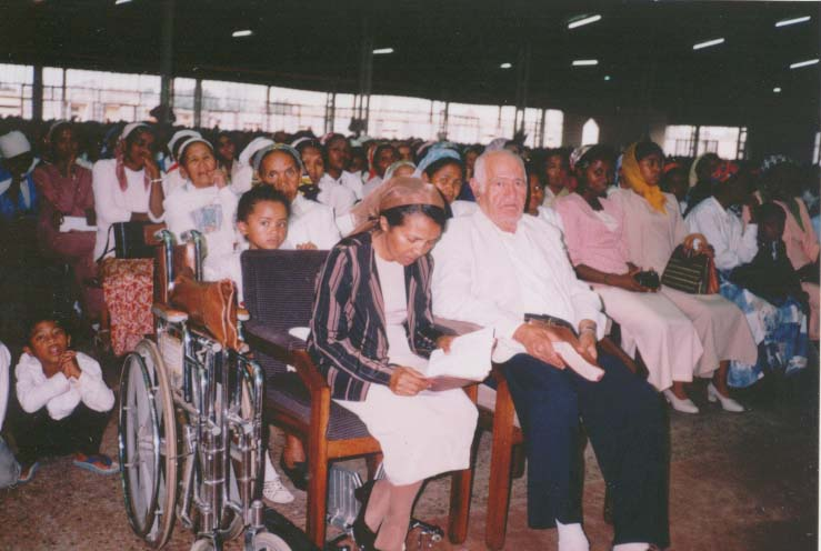 Malagasy: MA Daoud sy mpandika teny